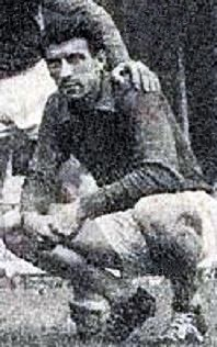 René Bliard, 'Football 79 - étoiles du passé'.